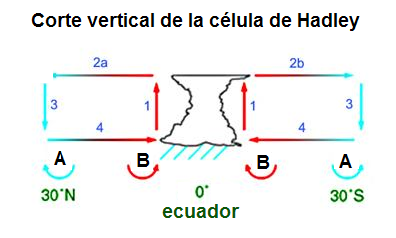 Corte transversal de una célula de Hadley, sistema atmosférico que transporta el calor hacia los polos y determina el tiempo atmosférico de la Tierra.Creado con Photoshop. 2004 D. Windrim (Versión en español: Izmir2)